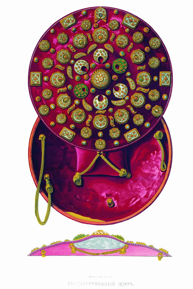 Государственный щит Изображенный государственный щит принадлежит к чину царскому и выносится при торжественных поставлениях на царство. Он кожаный, обтянутый алым бархатом. Посредине или вверху щита круглый хрустальный плащ в золоте, с врезанными в золотых гнездах шестнадцатью яхонтиками. Вокруг среднего плаща шесть подобных же плащей (два из них зеленого хрусталя), но с прорезами сбоку, для вставки гнезд с драгоценными камнями, которых, однако же, недостает. Эти плащи обставлены четырнадцатью золотыми гнездами, заключающими в себе изумруды, яхонты и бирюзу, и восемью яшмовыми, обделанными в золото, косичками, в которых в каждой по три яхонта. За ними следует ряд, состоящий из двенадцати круглых с прорезами и золотой обделкой яшмовых плащей и двенадцати косичек, с врезными в золотых гнездах яхонтами и бирюзами. За этим рядом следует ряд меньших яшмовых плащей, также украшенных золотой насечкой и яхонтами, и между ними двенадцать золотых гнезд с тремя яхонтами и девятью бирюзами. По окраине щита — шесть яшмовых с яхонтиками и золотой насечкой блях, шесть круглых яшмовых, подобных вышеупомянутым, плащей и двенадцать золотых гнезд с яхонтами и бирюзой. В поперечнике щита 13 1/2 вершков.